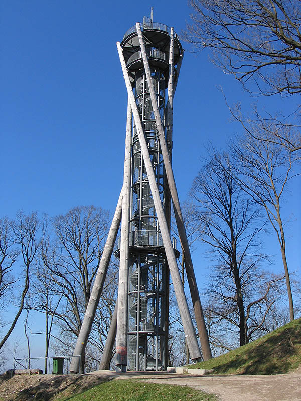 Aussichtsturm auf dem Schlossberg, Freiburg im Breisgau, Deutschland